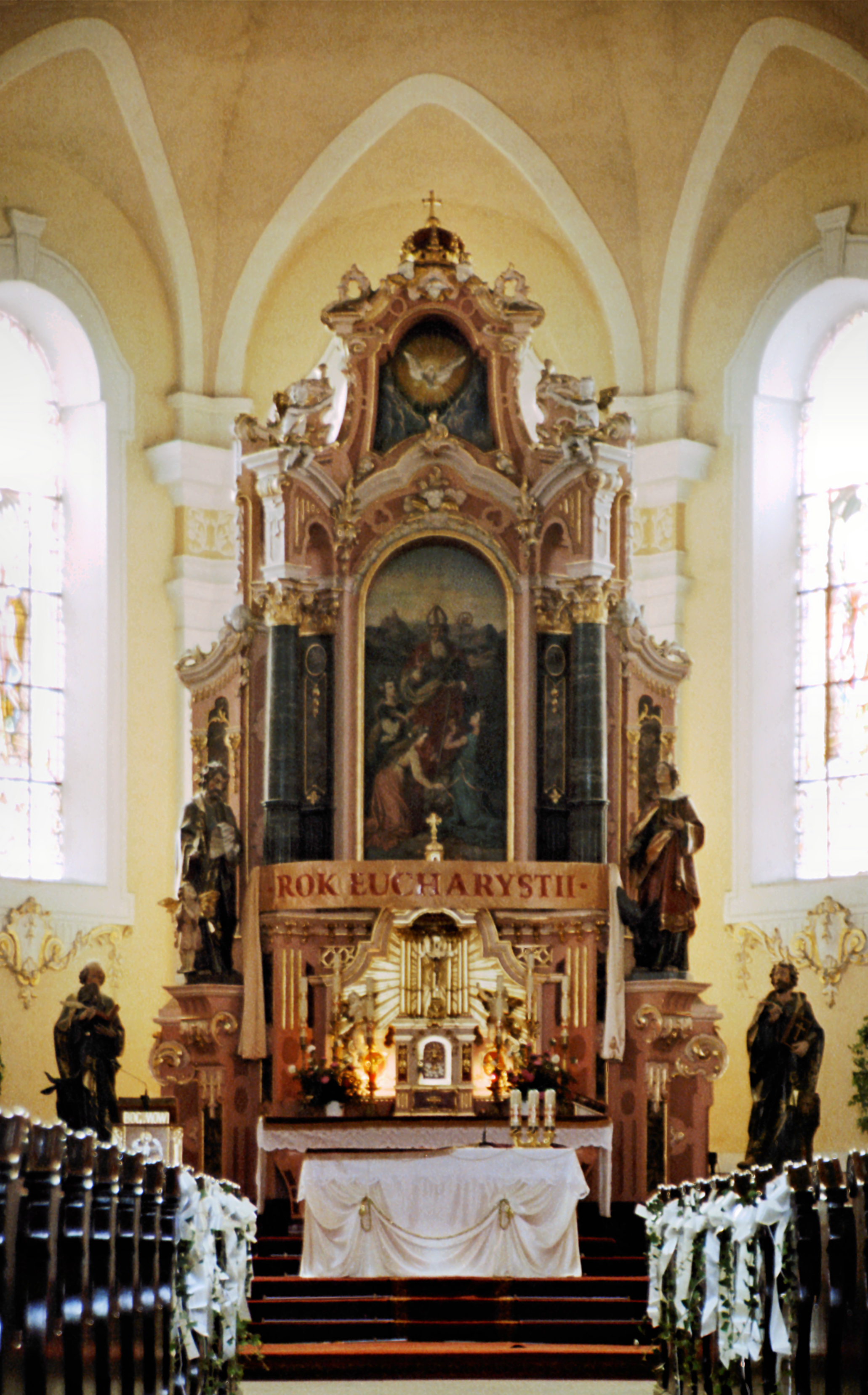 Ujście, kościół p.w. św. Mikołaja, 1905-06